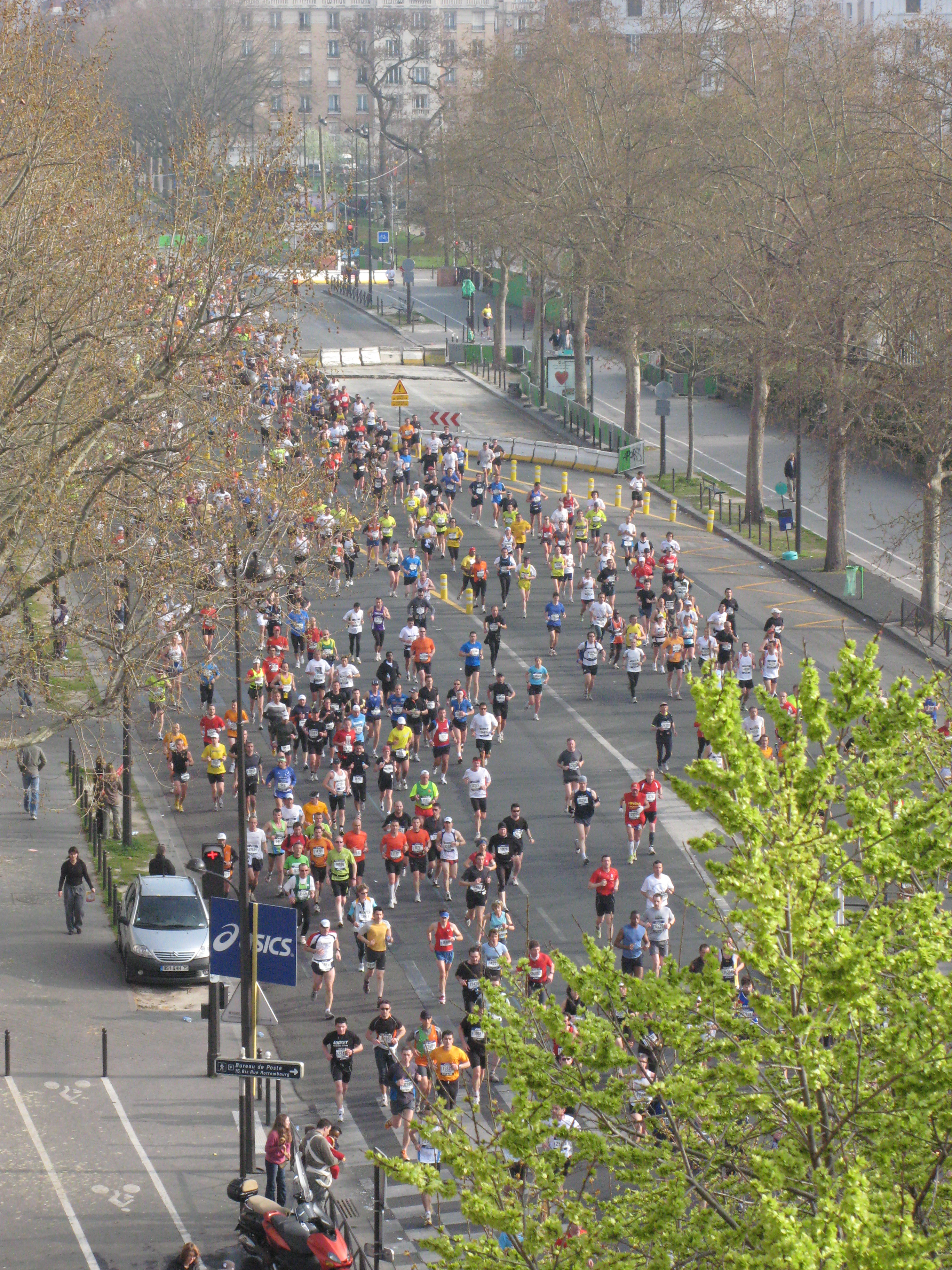 Le boulevard Soult lors du Marathon de Paris le 5 avril 2009.